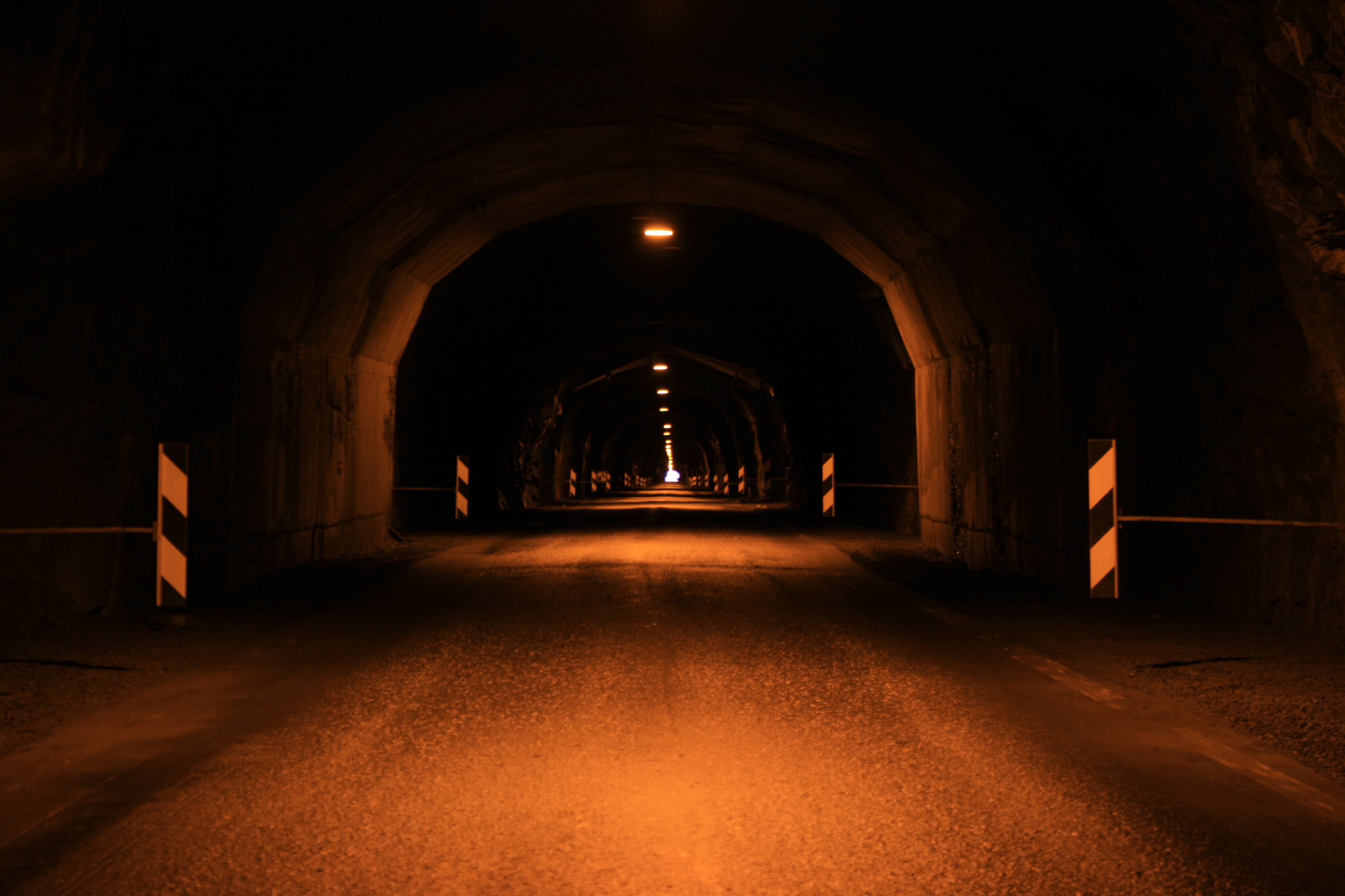 Steinfjelltunnelen